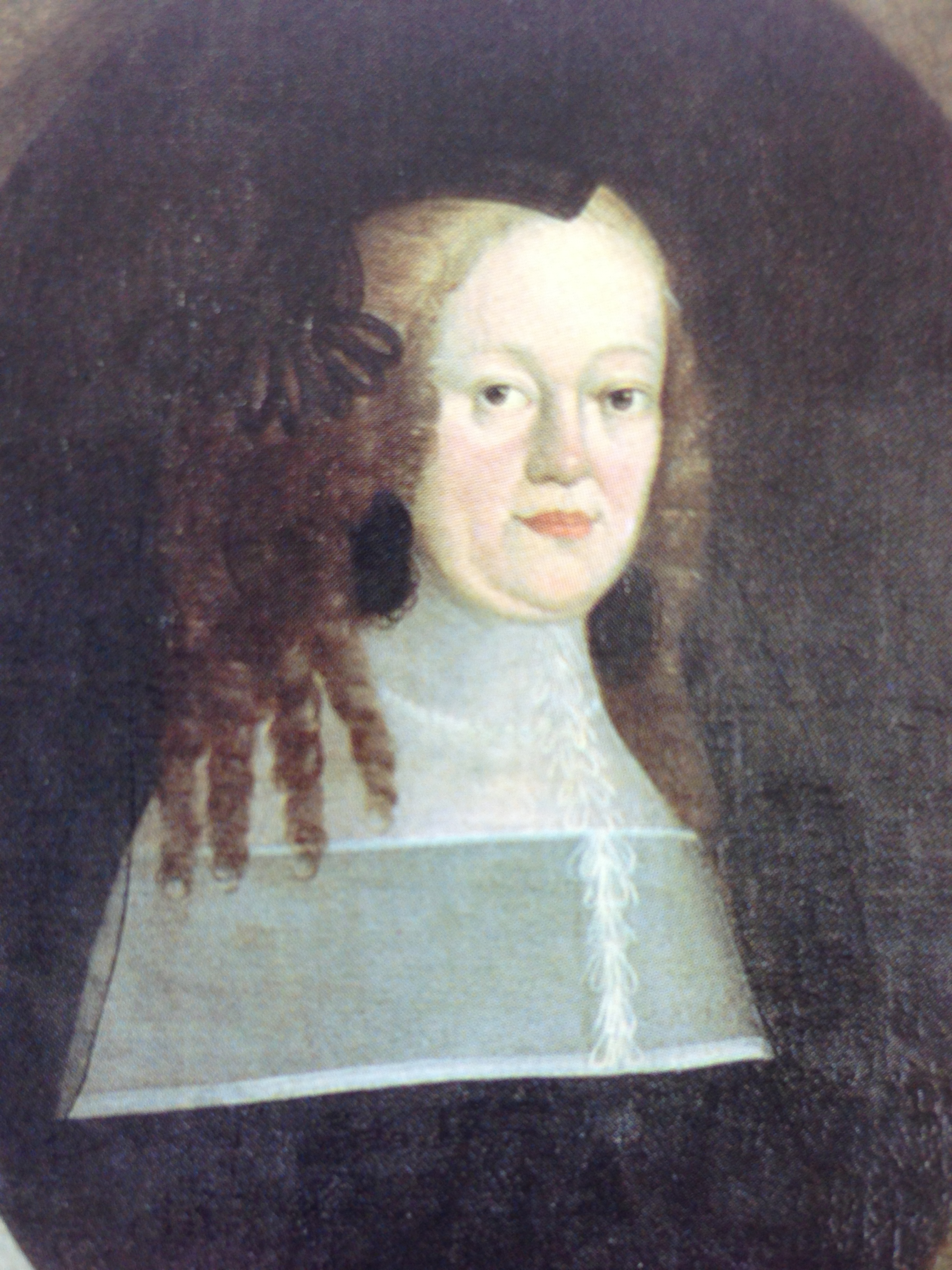 Eigene Fotografie eines Gemäldes aus dem Jahr 1675.